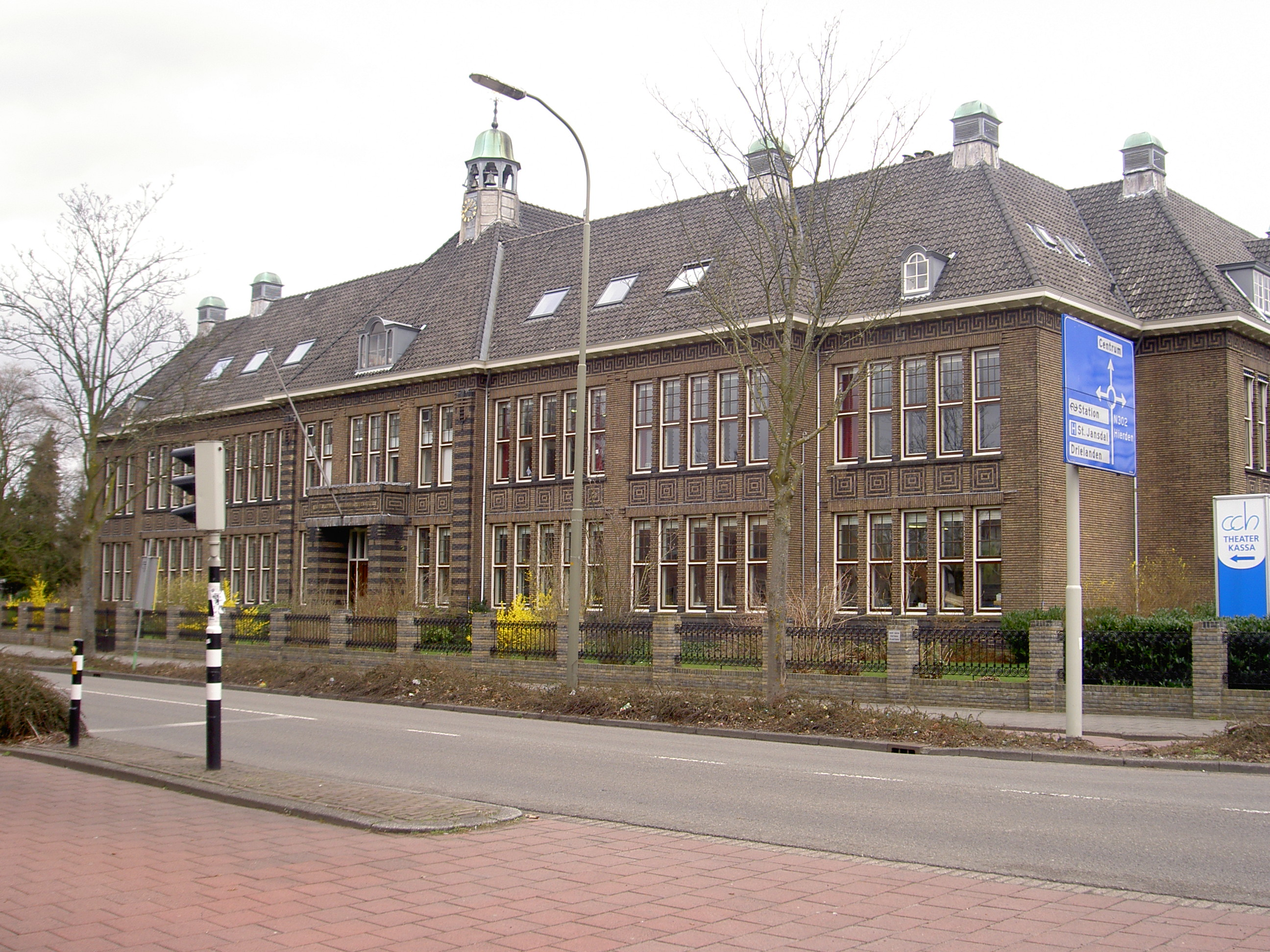 Foto van het pand van het Christelijk College Nassau-Veluwe te Harderwijk. Zelfgemaakt